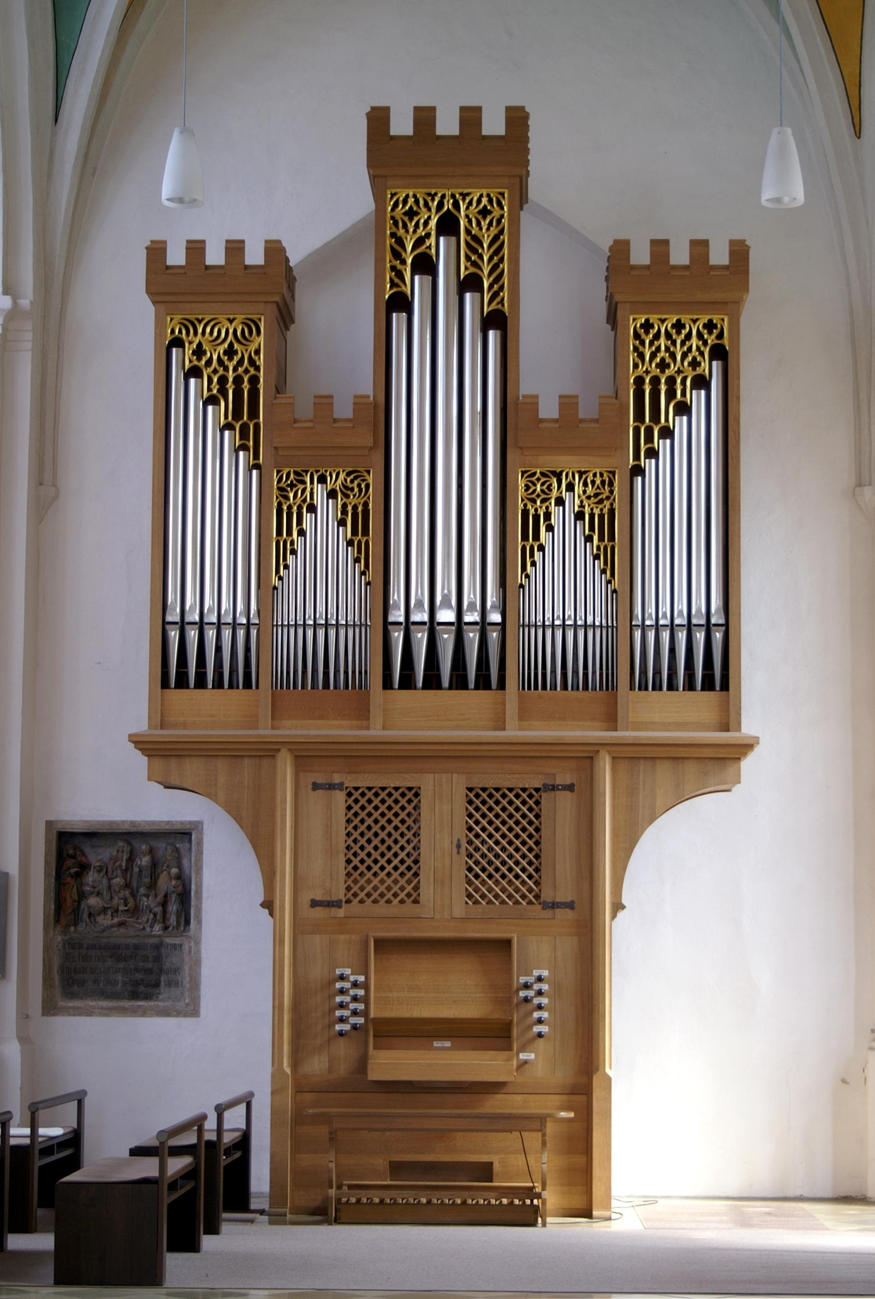 Neue_Orgel_St.Jodok_Landshut_2012